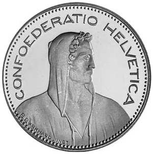 5 CHF / Fünffranken